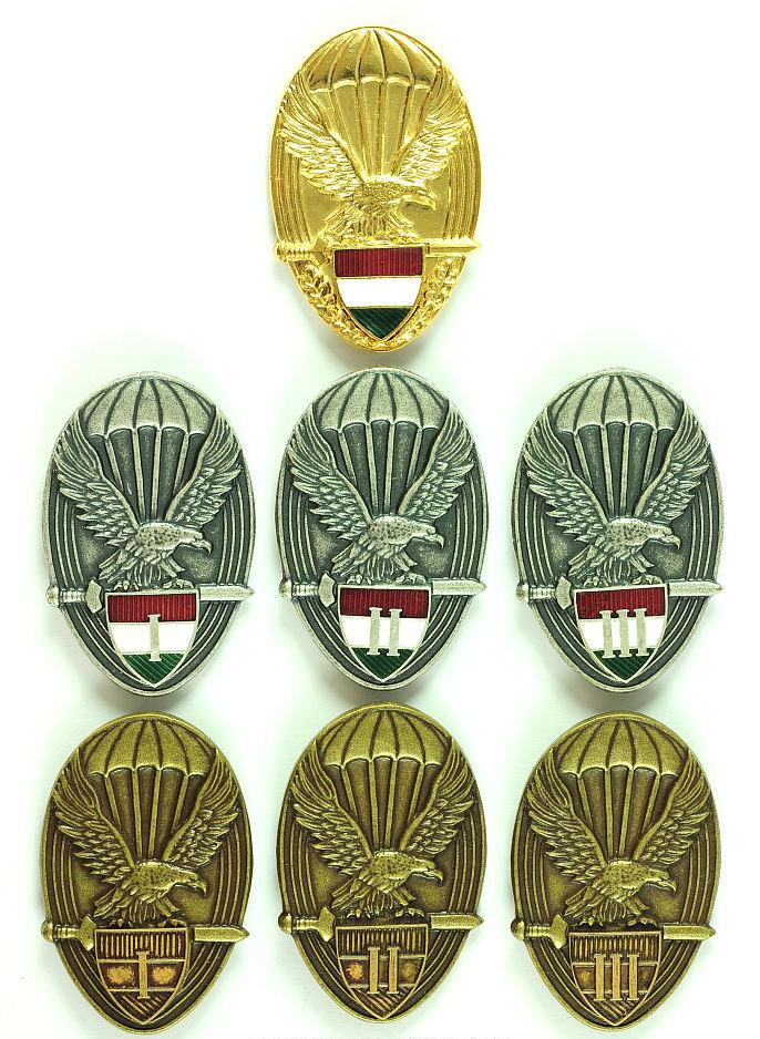 MH Ejtőernyős Jelvények 1990 után